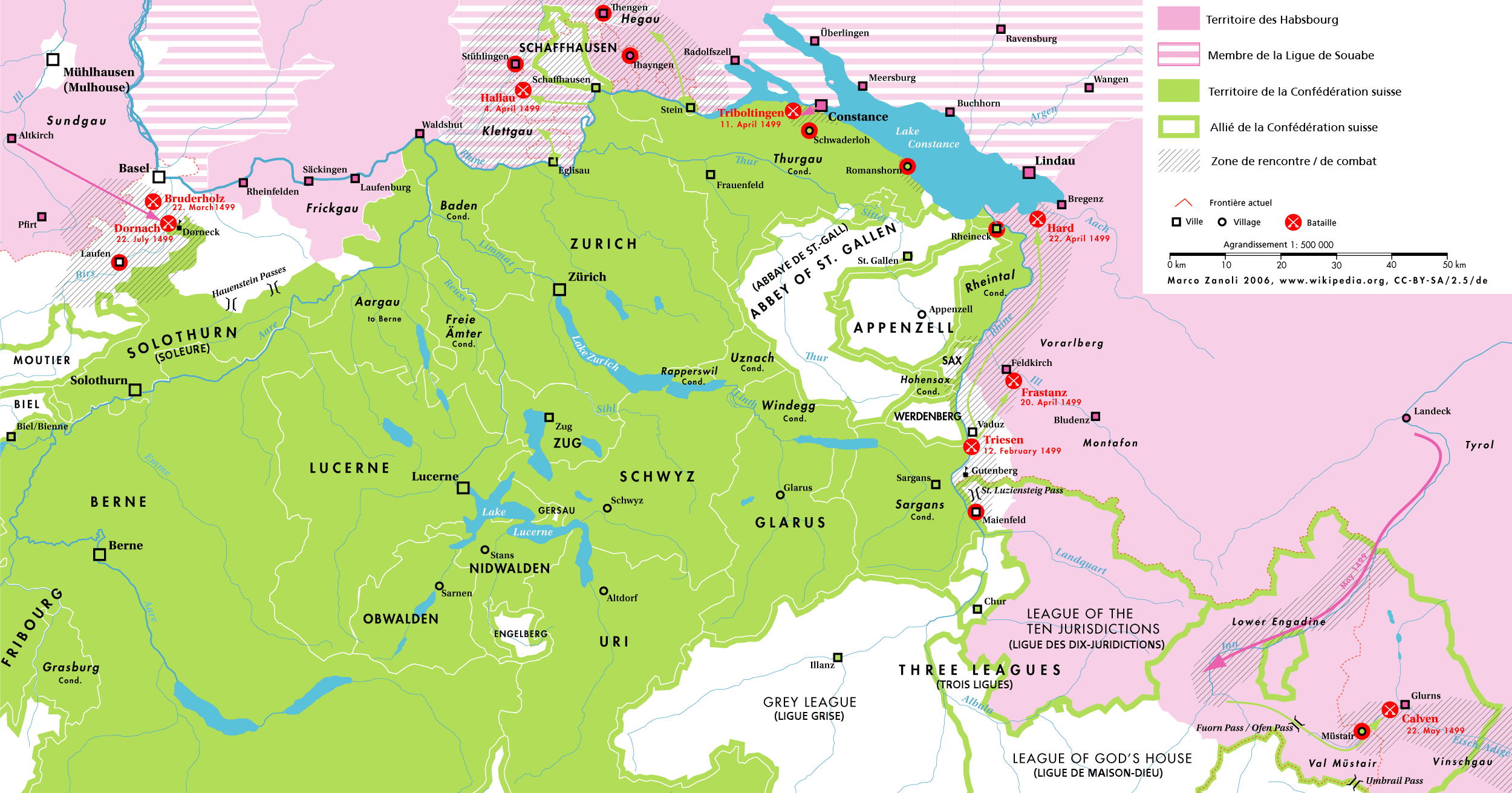 Übersicht über den Schwabenkrieg 1499